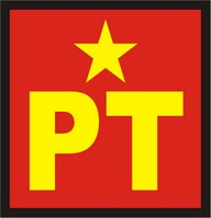 Logotipo del Partido del Trabajo